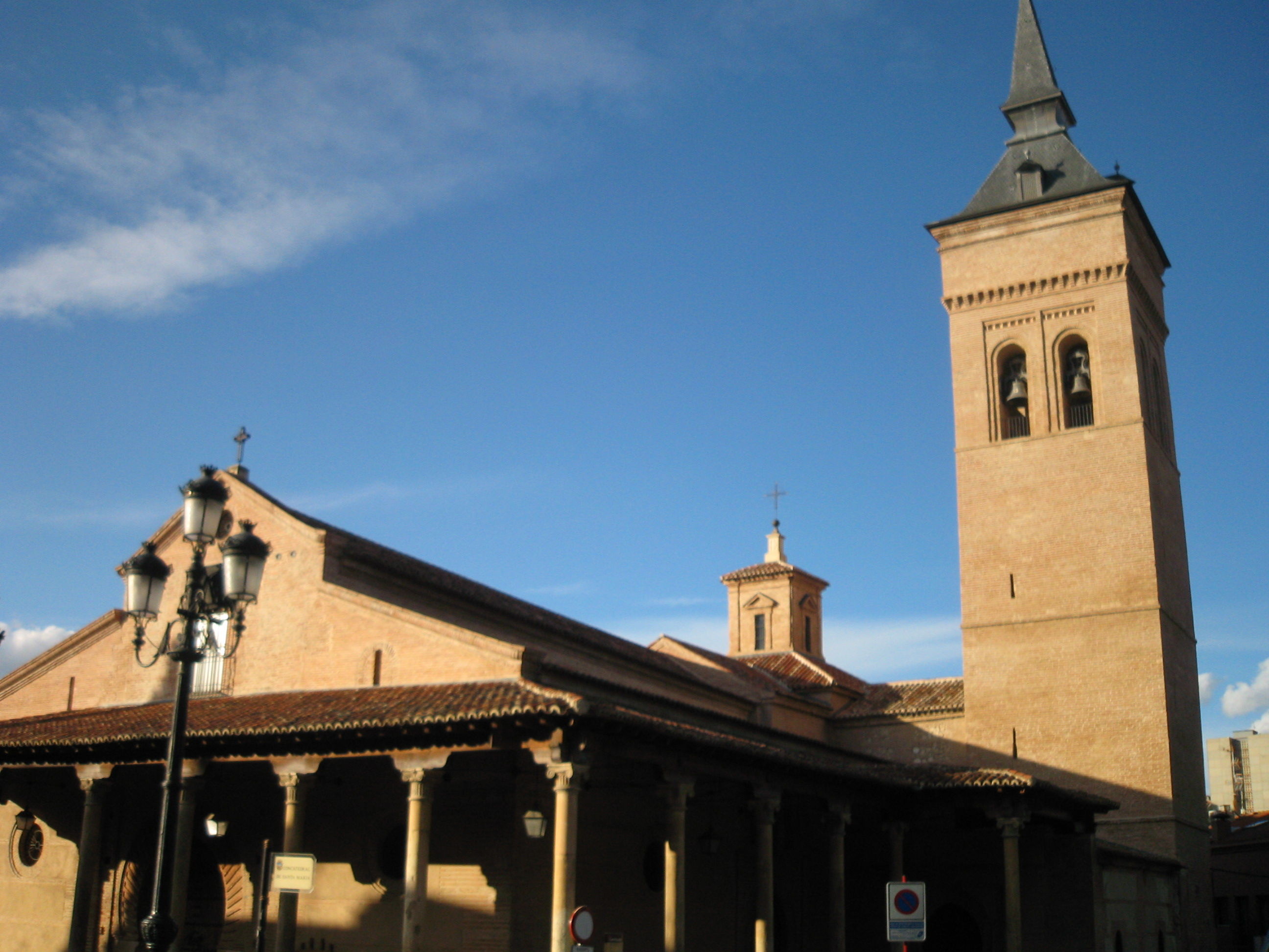 Concatedral de Santa María de Guadalajara in Guadalajara, Spain